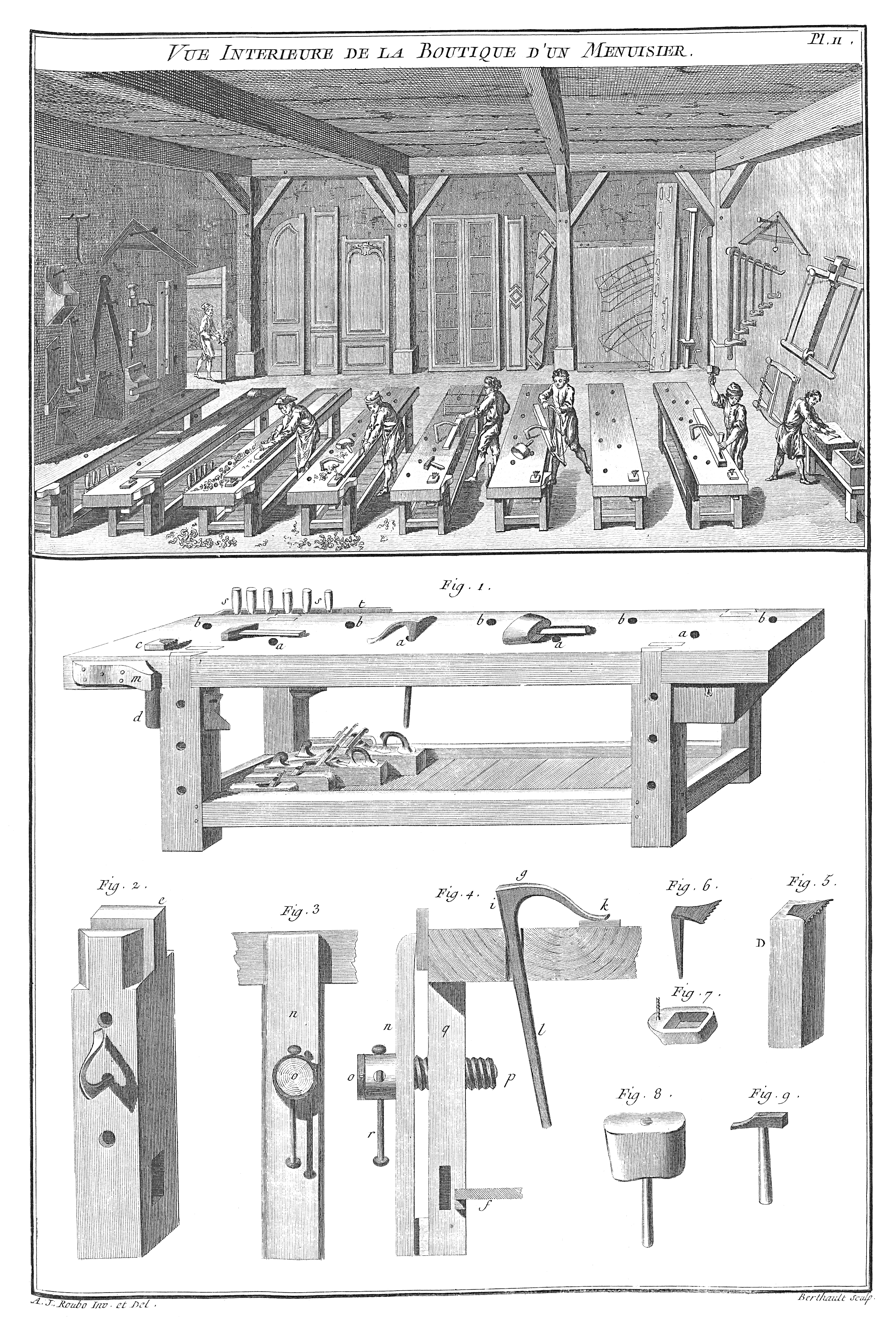 Vue Intérieure de la Boutique d'un Menuisier.